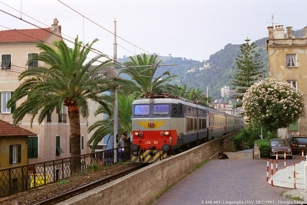 L'Intercity "Cycnus", trainato dalla locomotiva elettrica E.656.481, transita attraverso il centro abitato di Laigueglia.